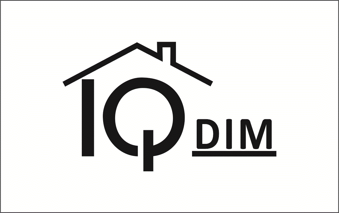 логотип iqdim